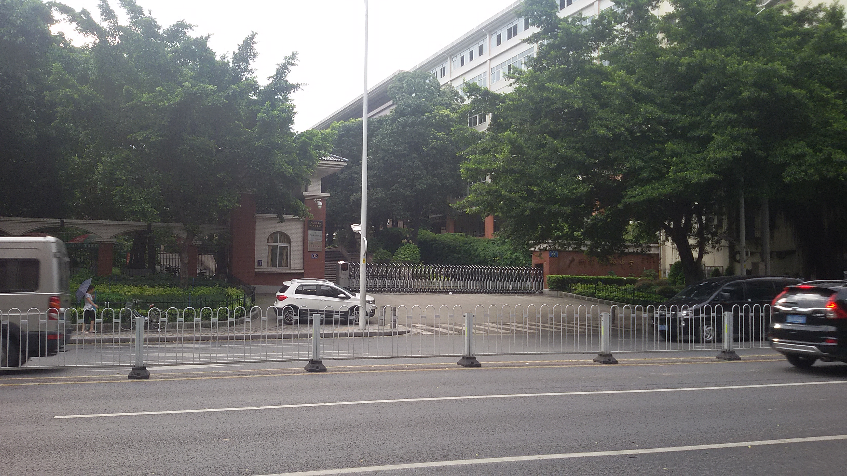 粵語: 广州市协和中学嘅正门